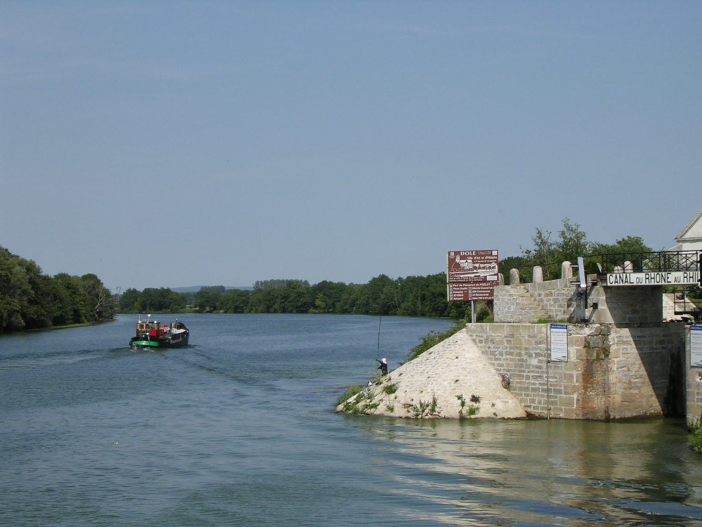 La Saône à Saint-Symphorien-sur-Saône et l'embouchure du canal du Rhône au Rhin